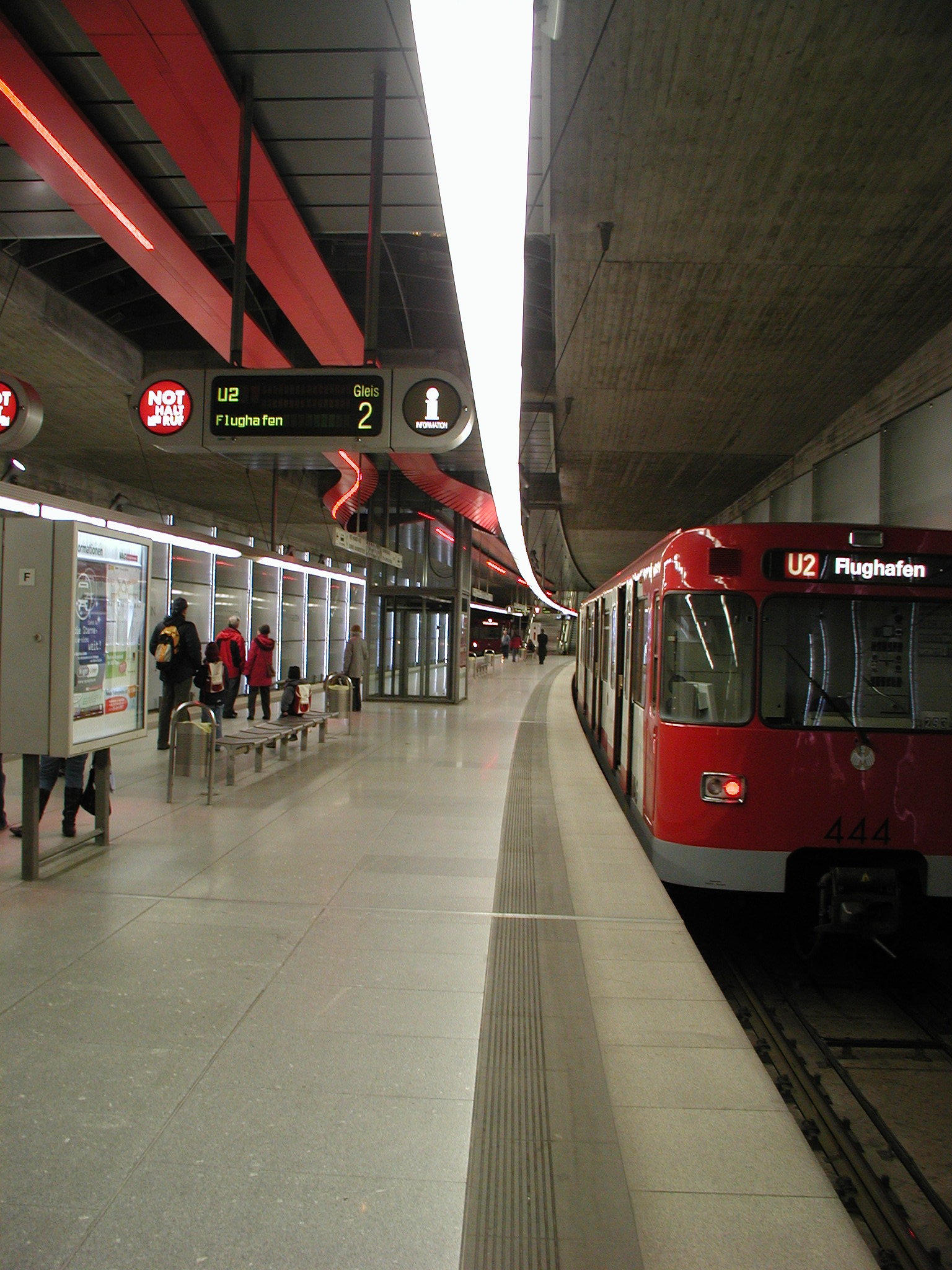 U-Bahnhof Nürnberg Ziegelstein